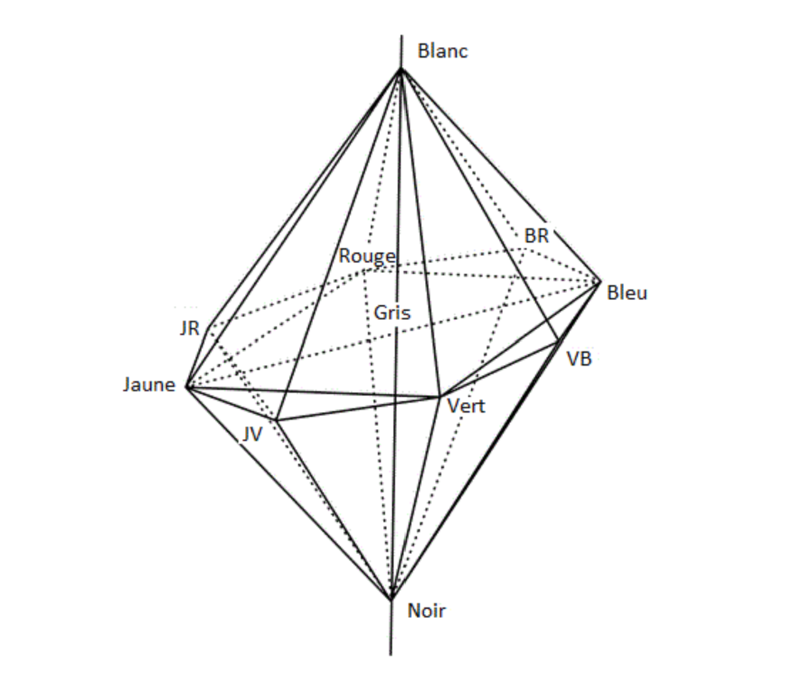 Les couleurs sont vues intermédiaires et combinaisons d'autres couleurs ; le gris est combinaison de noir et de blanc, de même que rouge-bleu est intermédiaire entre bleu et rouge. L'orange par exemple, est intermédiaire entre le rouge et le jaune (JR), le cyan entre le bleu et le vert (VB). Le blanc et le noir sont limites des autres couleurs ; ces limites sont représentées sur une ligne droite, en opposition, car elles s'excluent. De même les couleurs "jaune-vert", ou "jaune-bleu" sont des non-sens.